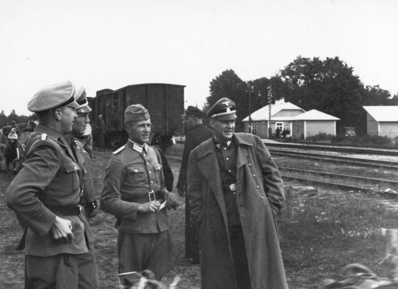 Wolhynien-Umsiedlung: Brigadeführer Globocnik verabschiedet einen Umsiedlerzug Aufnahmejahr: 1940 Quelle: SS- und Polizeiführer Lublin